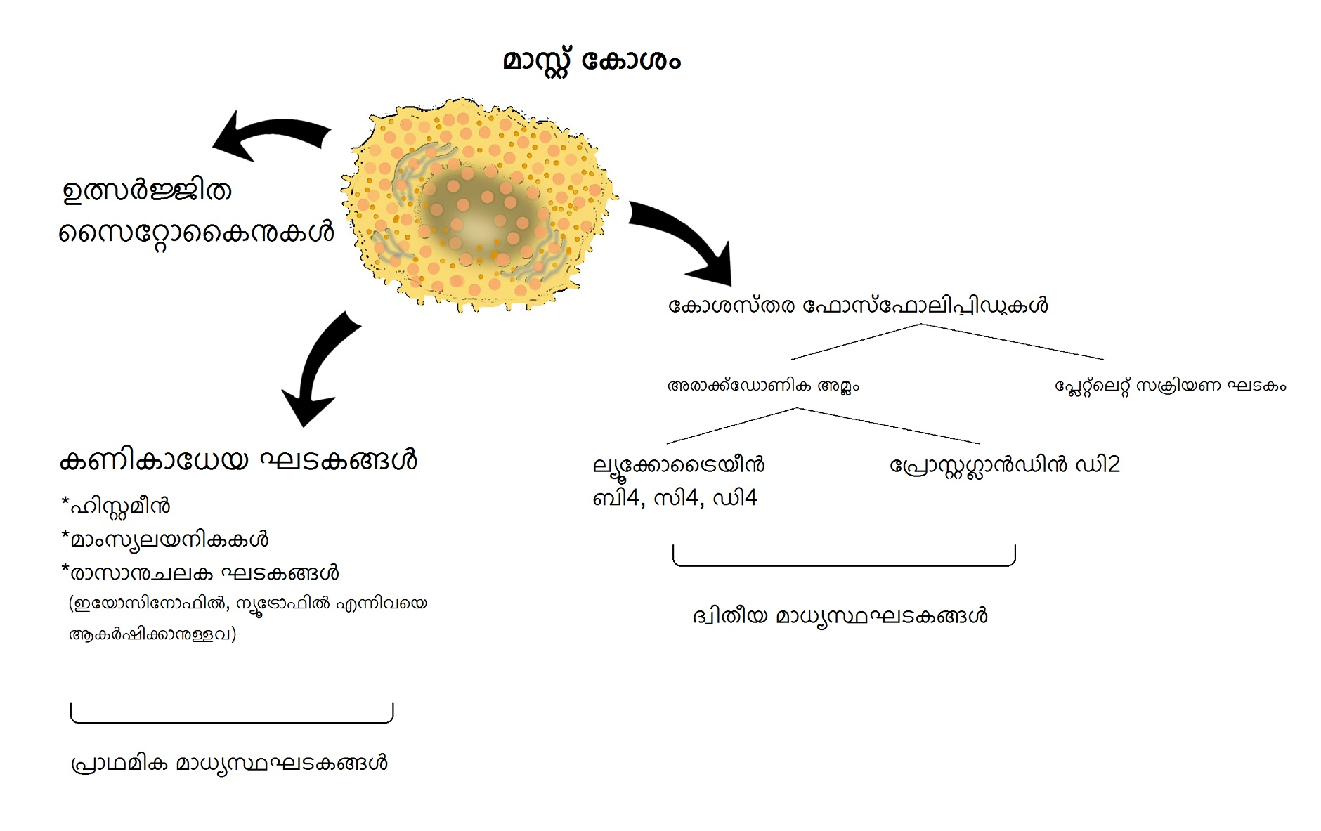 മാസ്റ്റ് കോശവും അത് ഉത്സർജ്ജിക്കുന്ന ജൈവരസങ്ങളും